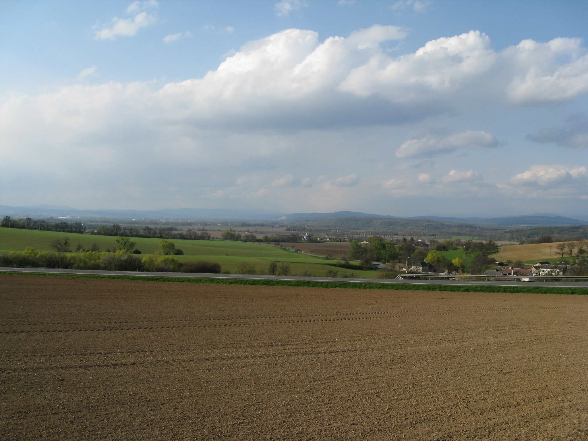 Česky: MB pohled S směrem od Třesína (severní část CHKO Litovelské Pomoraví)